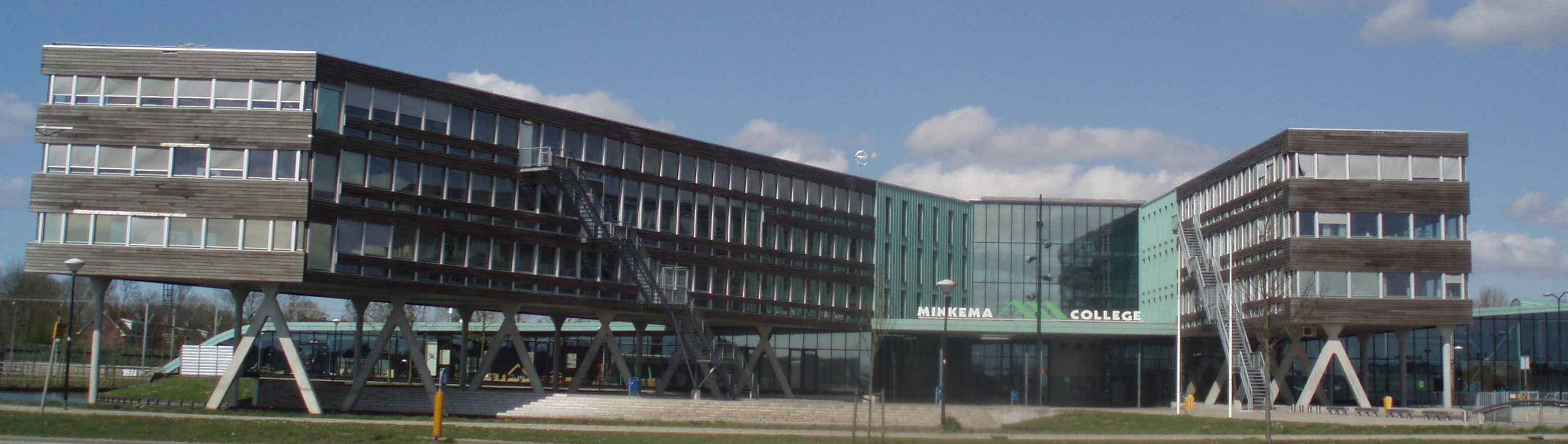 Het Minkema College in Woerden.